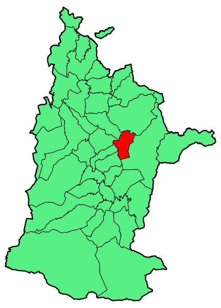 Aipaturiko udalerriaren kokapena Zuberoan